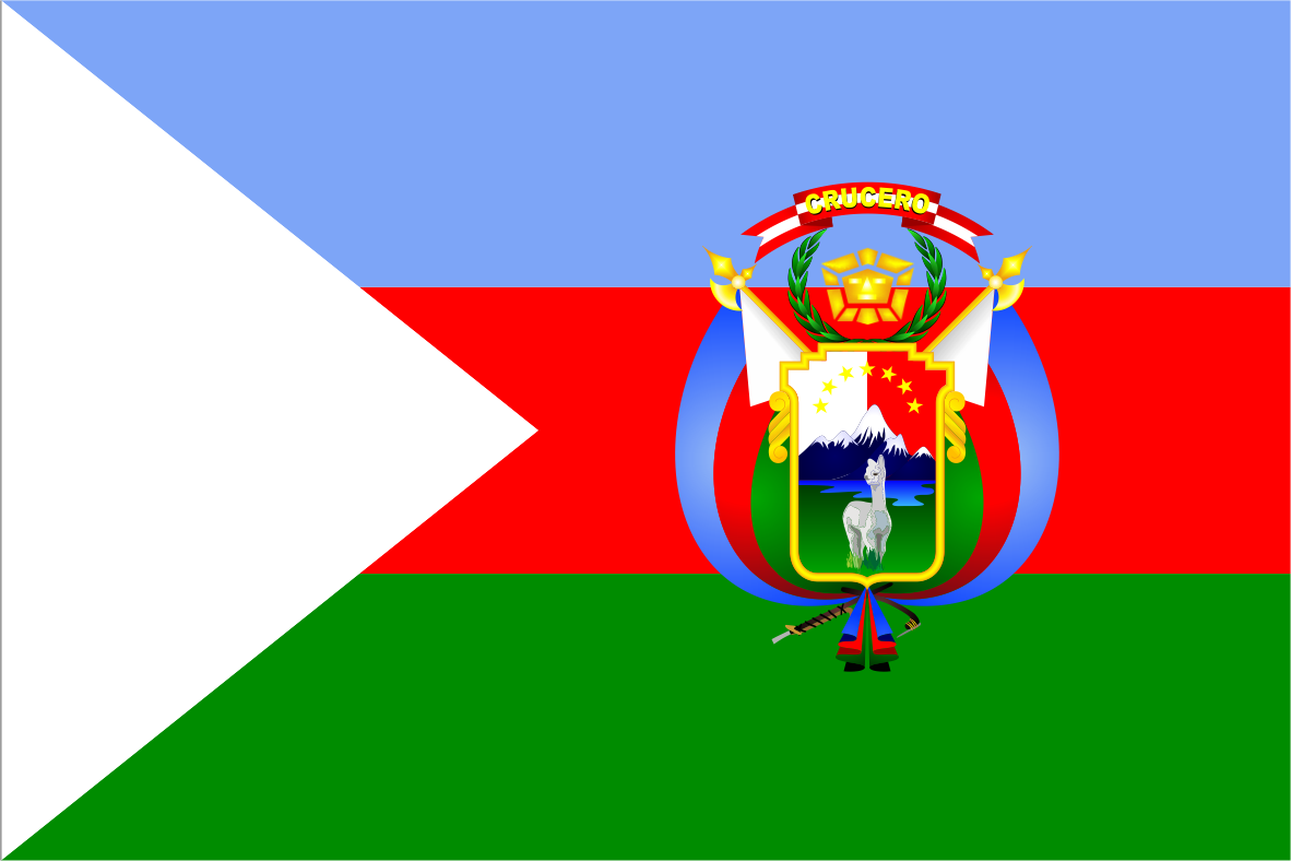 Distrito de Crucero - Provincia de Carabaya - Región Puno